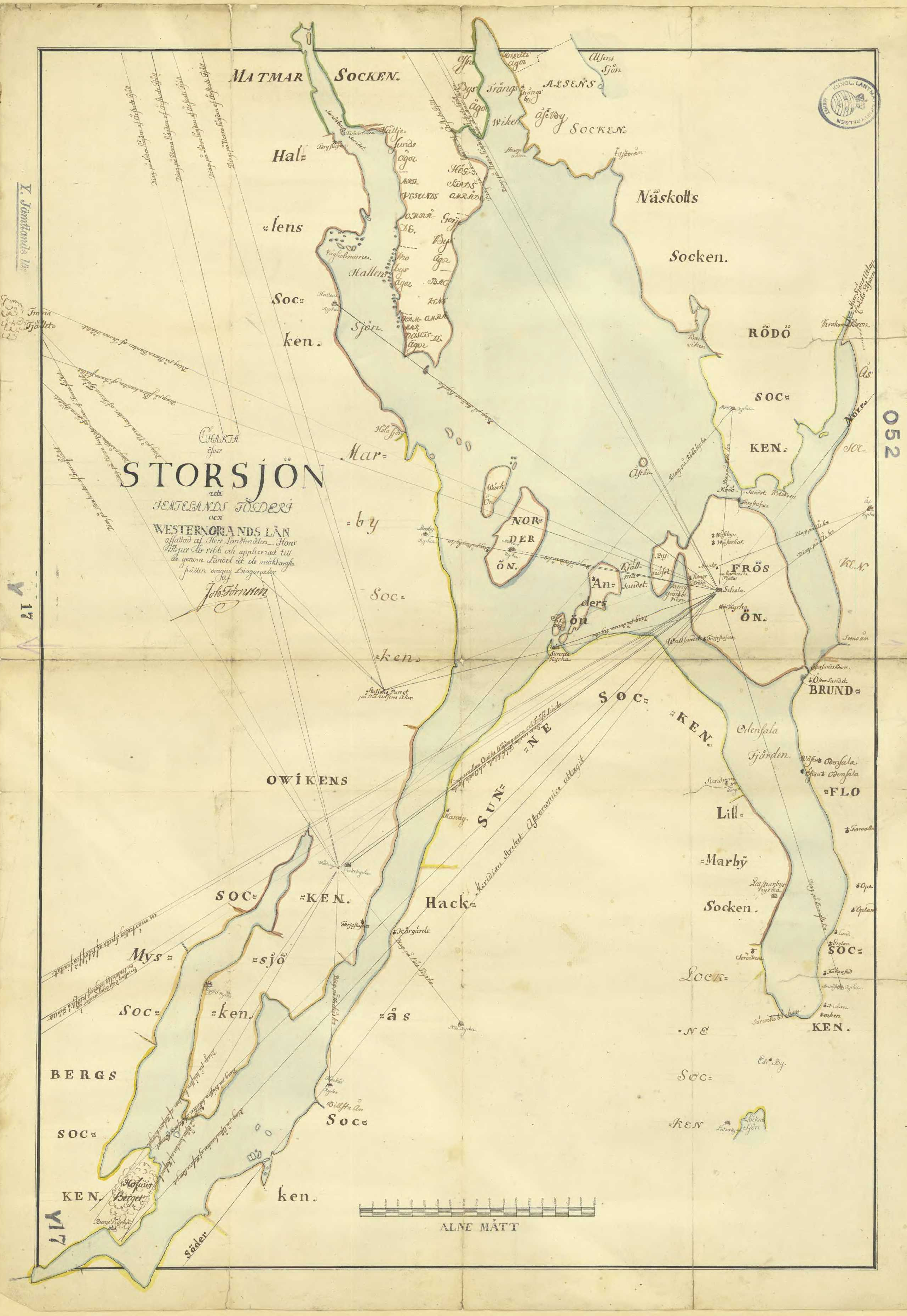 Karta över Storsjön av J Törnsten.